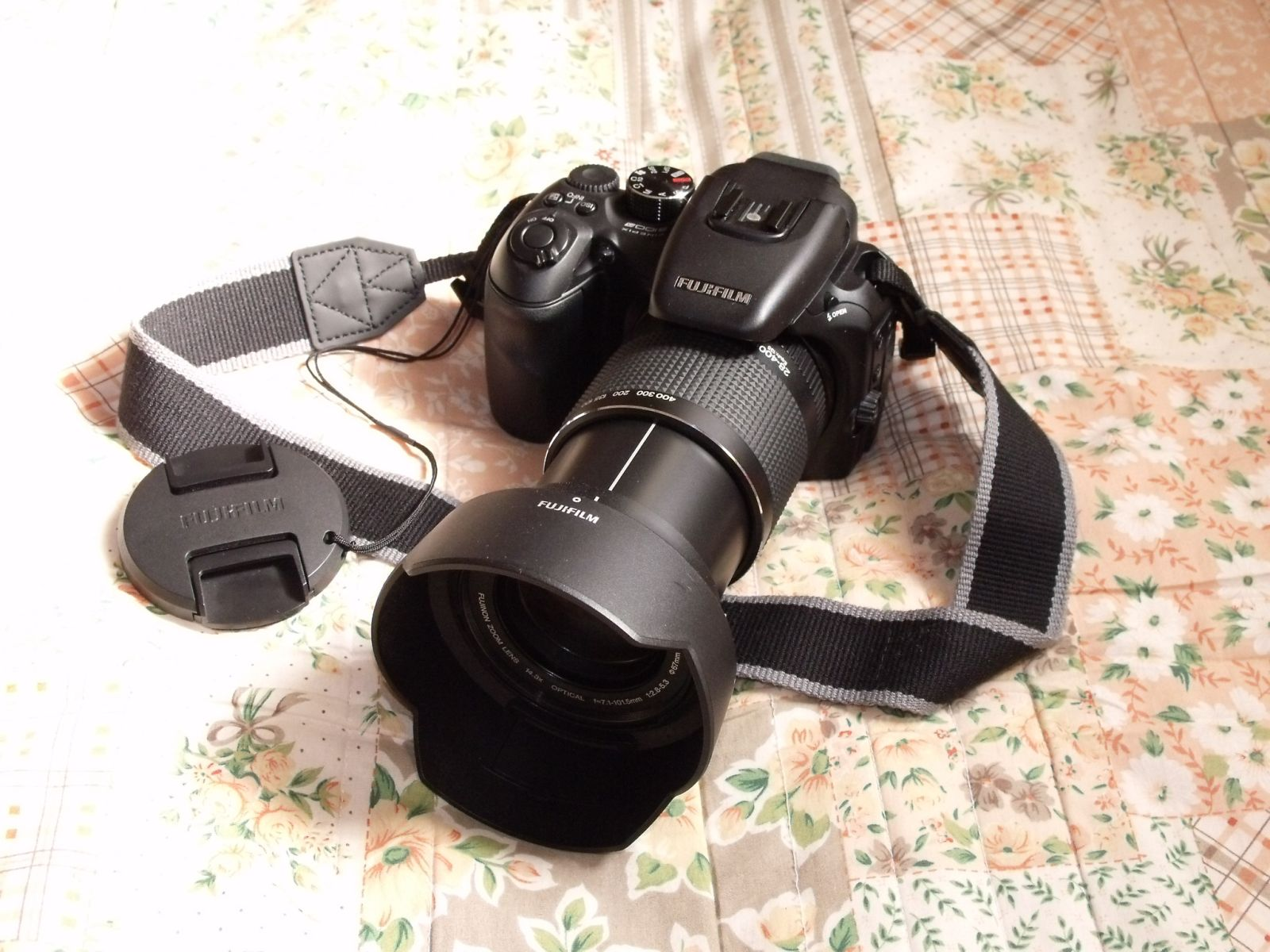 Fujifilm S100FS